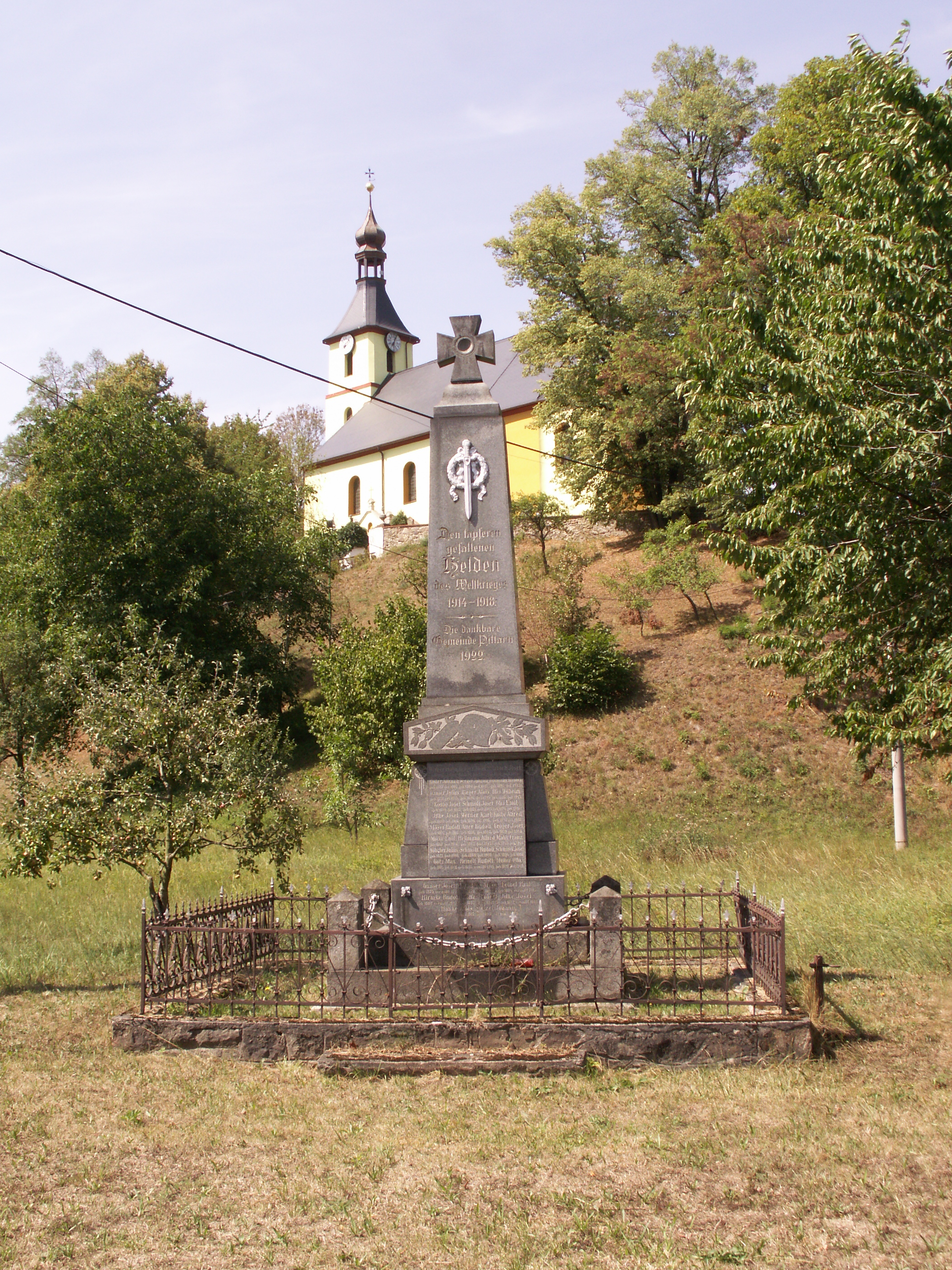 Pitárné, část obce Vysoká, okres Bruntál, kraj Moravskoslezský, památník obětem první světové války a kostel Navštívení Panny Marie